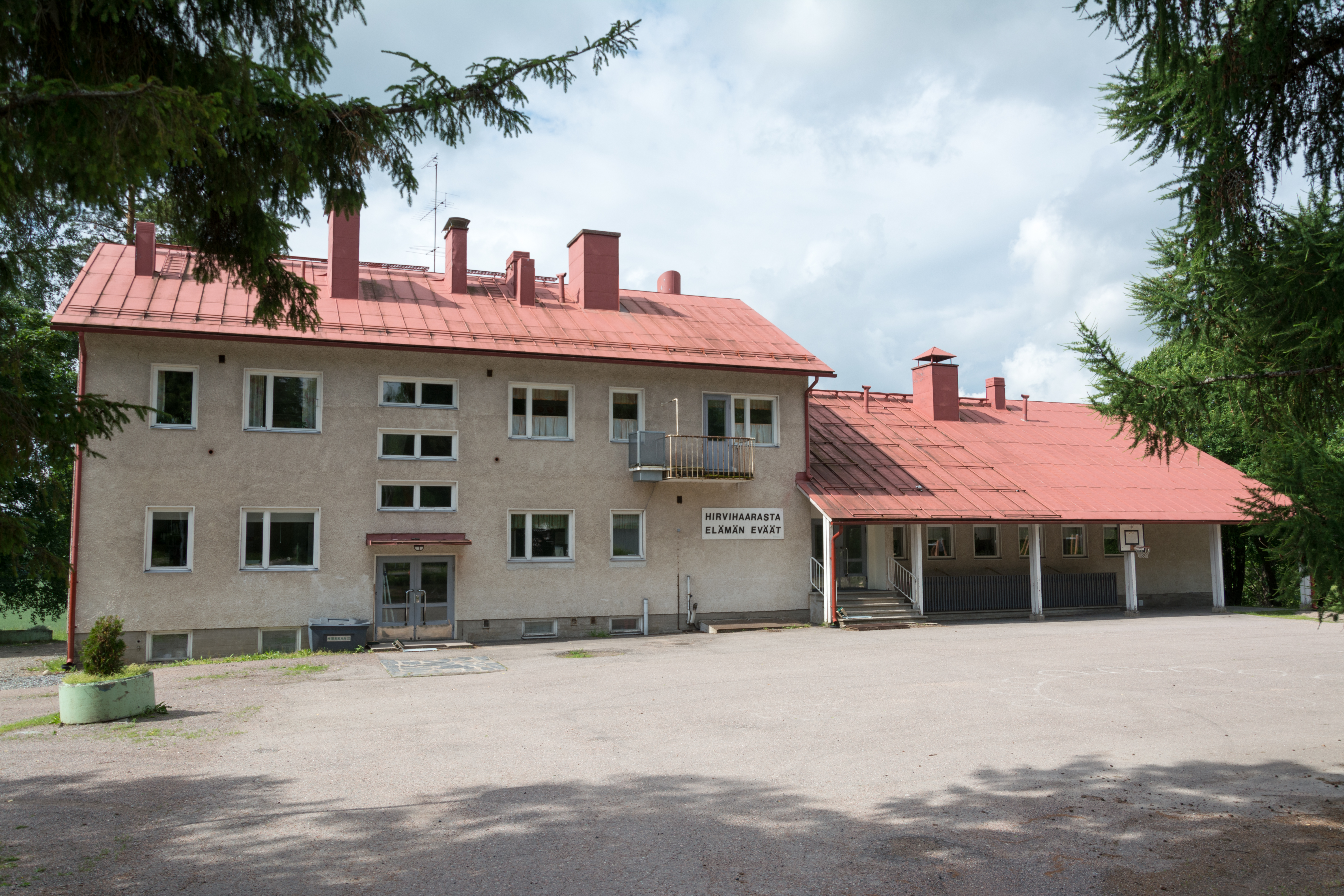 Hirvihaaran koulun uusi puoli